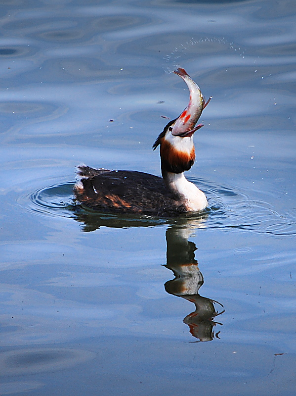 Haubentaucher (Podiceps cristatus) mit Fang